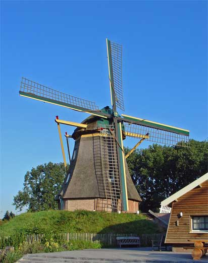 De Besthmenermolen nabij Ommen